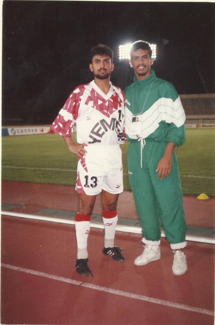 الكابتن اسعد المقطري مع الكابتن خالد عفارة في قطر في بطولة الاسقلال سنة 1994م